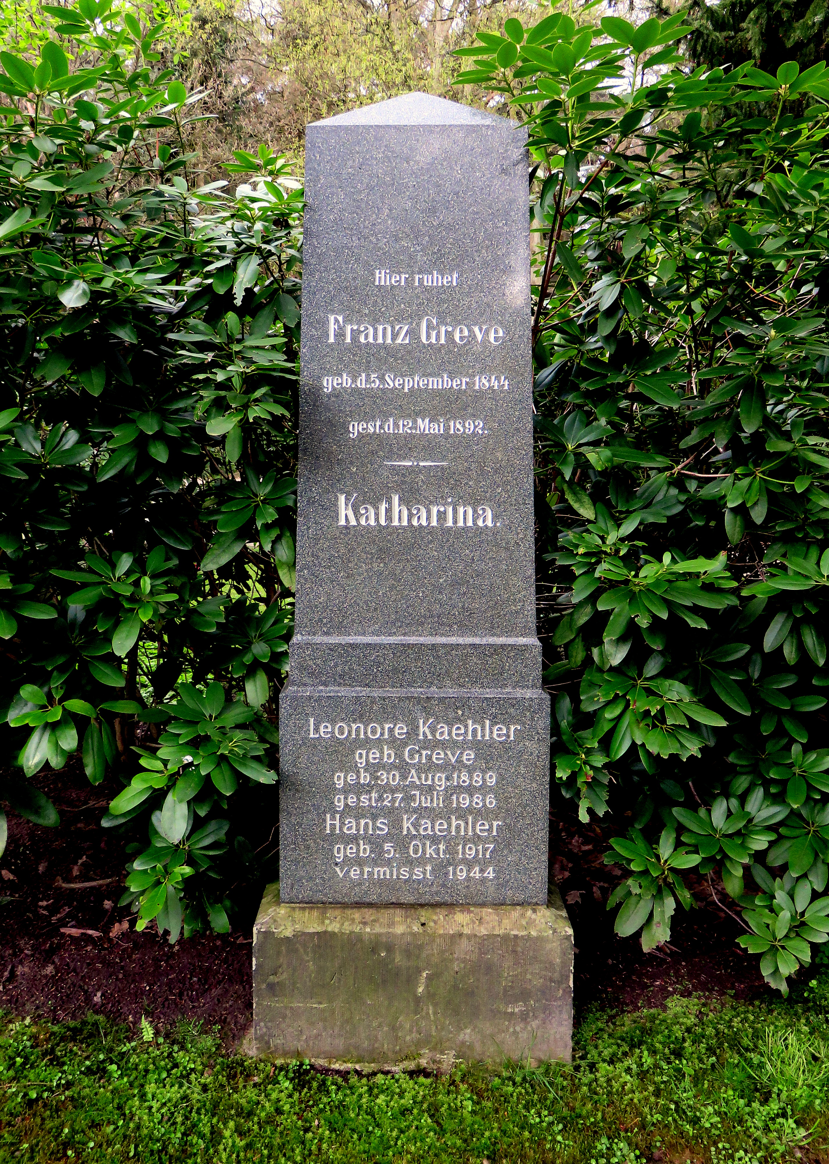 Historischer Grabstein der Opernsängerin Katharina Klafsky im Bereich des Gartens der Frauen auf dem Ohlsdorfer Friedhof in Hamburg-Ohlsdorf.Ursprünglicher Standort: Planquadrat X 5 (oberhalb Talstraße, Höhe Krematorium) bei Hans-Günther Freitag: Von Mönckeberg bis Hagenbeck: ein Wegweiser zu denkwürdigen Grabstätten auf dem Ohlsdorfer Friedhof, Hansa-Verlag, Hamburg, 1973, Seite 64.